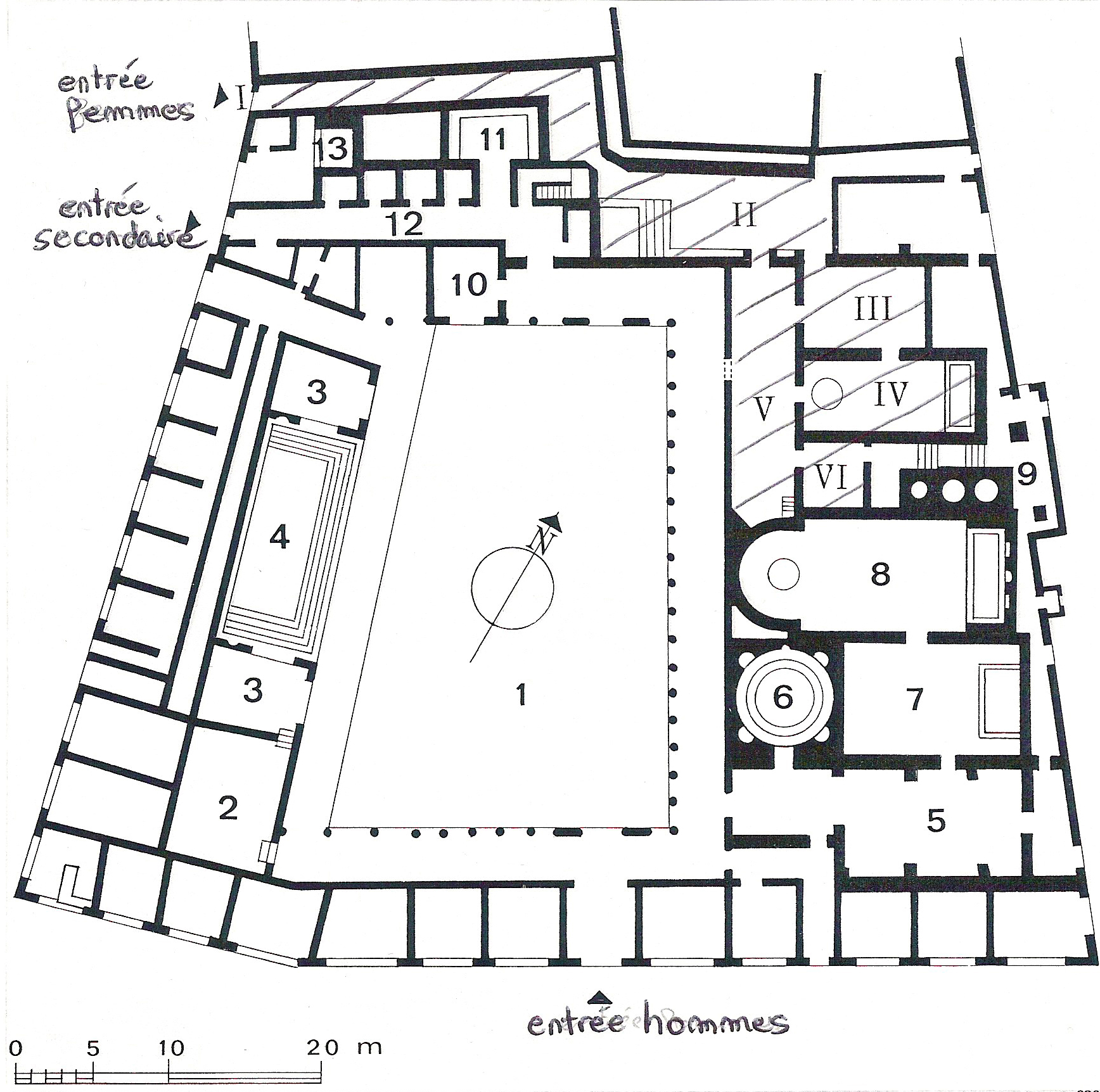 Plan des thermes de Stabies. Thermes masculins : 1. Palestre 2. Apodyterium 3. Petit bassin lave-pied 4. Natatio 5. Apodyterium 6. Frigidarium 7. Tepidarium 8. Caldarium 9. Praefurnium 10. Bureau du responsable de l'etablissement 11. Latrines 12. Entrée secondaire et bains individuels 13. Puits